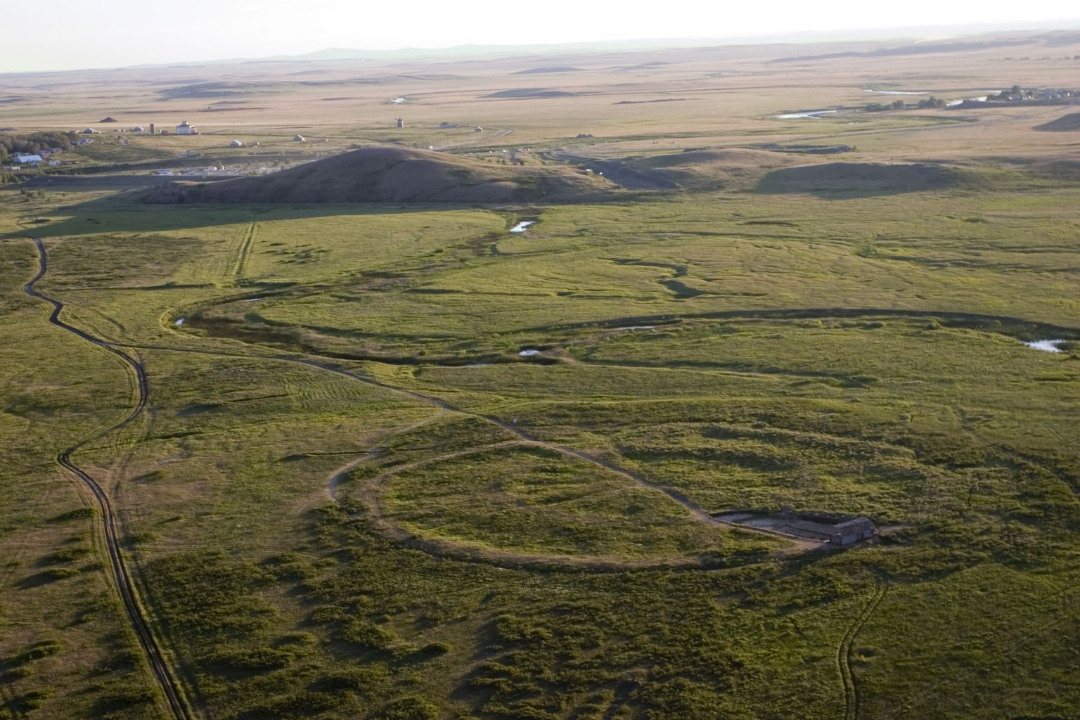 Городище "Аркаим": 10 км северо-западнее поселка, левый берег р.Большая Караганка, Амур, Брединский район, Челябинская область